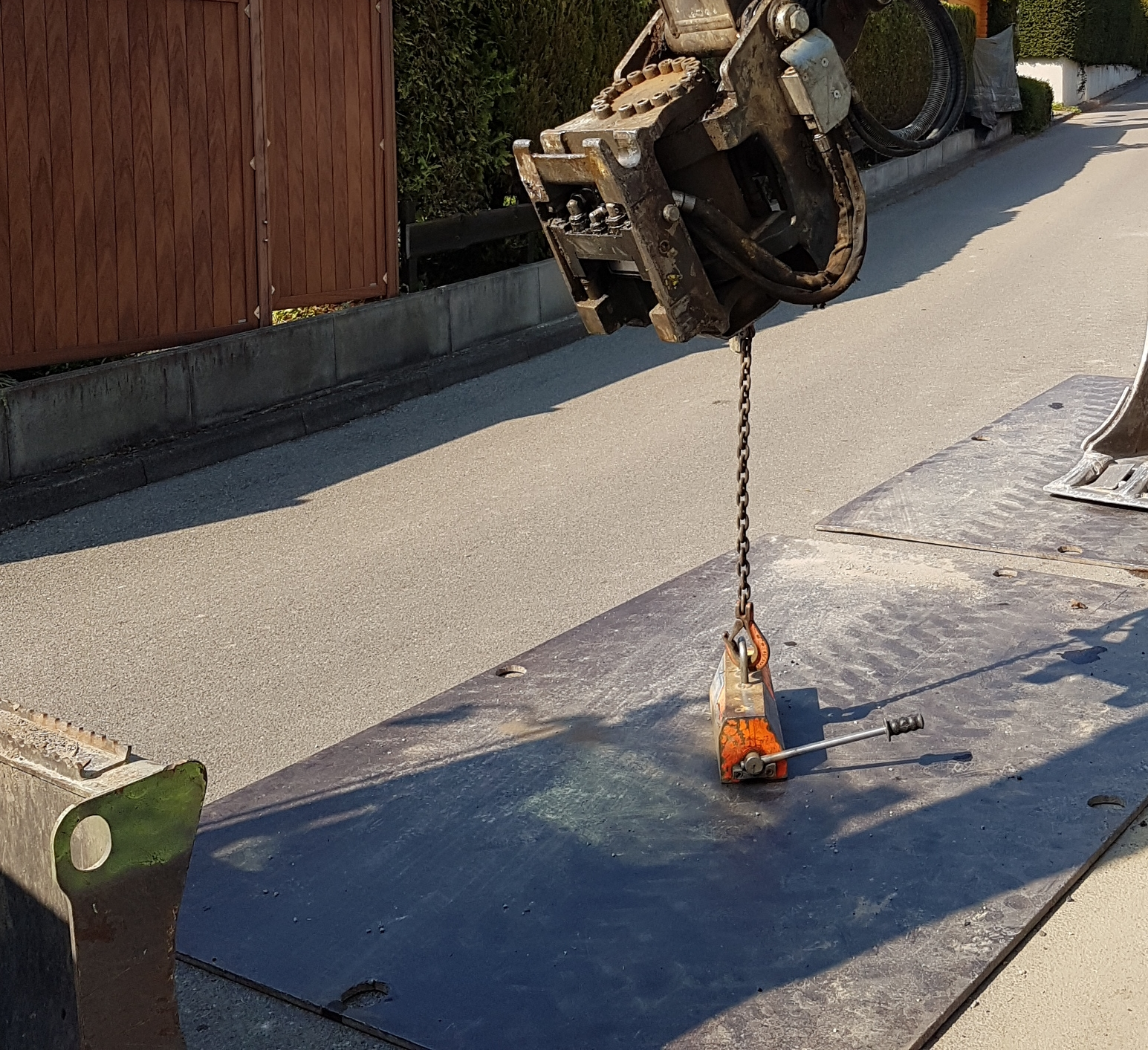 Lasthebemagnet an Überfahrplatte